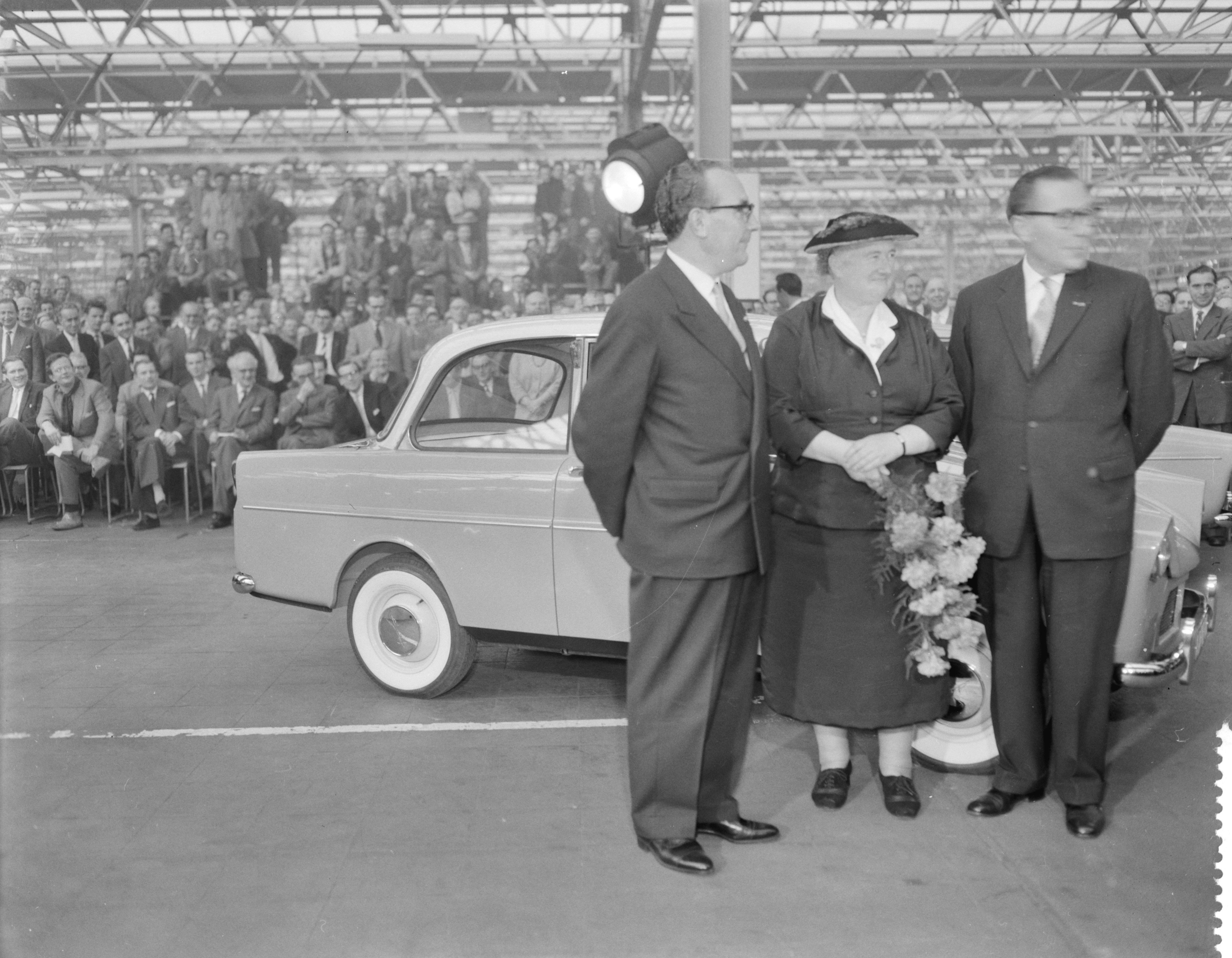 Eerste DAF personenauto is van de band gekomen in Eindhoven, v.l.n.r. Huub Van Doorne , mevrouw T. Smulders Belien en Wim Van Doorne